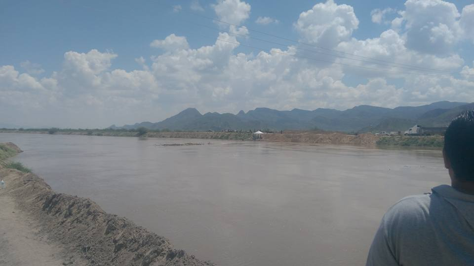 Este es el Río Nazas que pasa por San Pedro de las Colonias y desemboca en la Laguna de Mayrán, ubicada también en este municipio